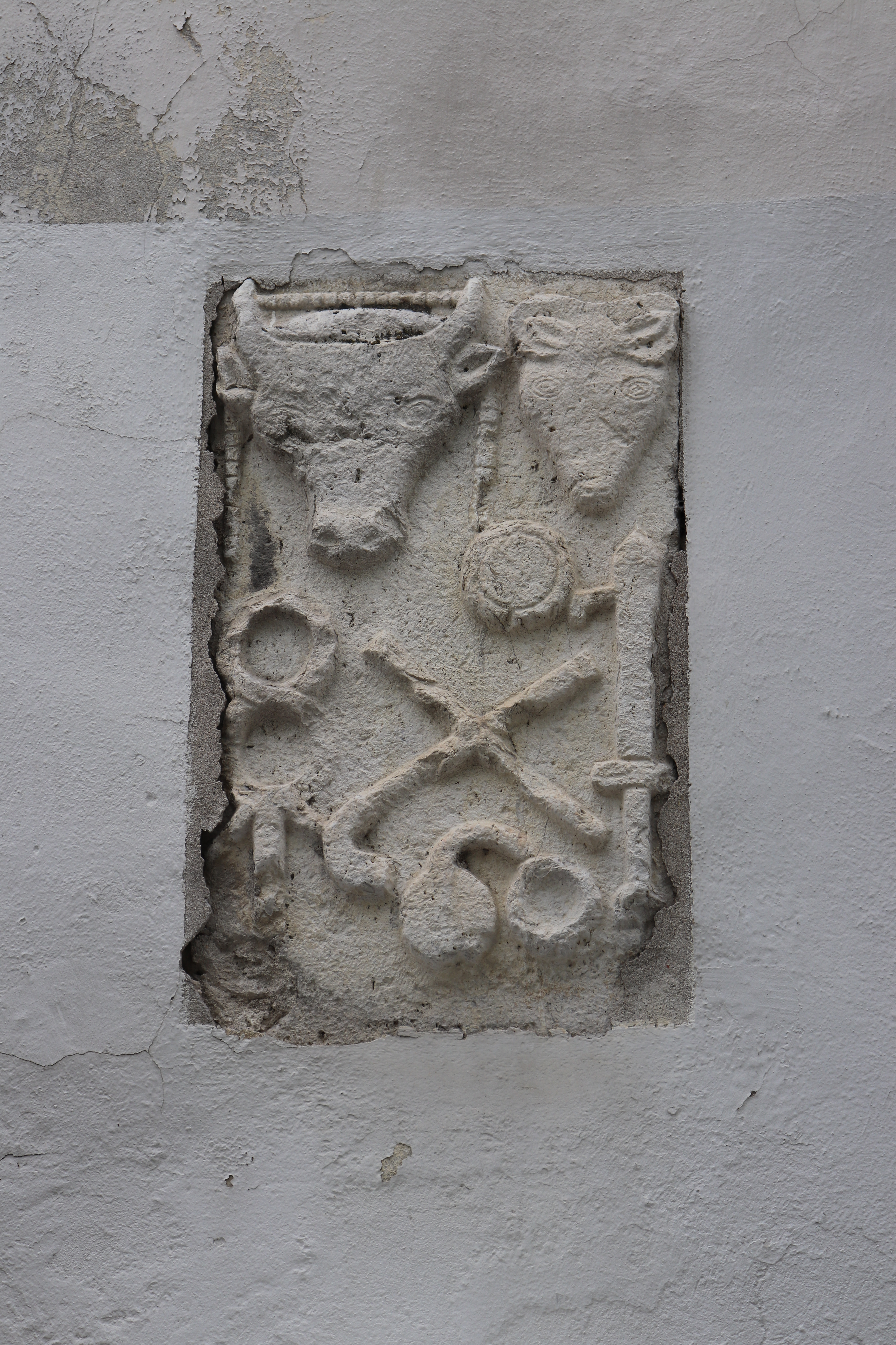 Autal taurobolique romain dans un mur de Die. Trouvé à Die et encastré dans le mur du tribunal. Pas d’inscription visible. Calcaire. Décor sculpté : têtes de taureau avec infulae, et de bélier, surmontant un caducée, corne et tibia (flûte) croisées, un tympanon, un harpè (couteau de sacrifice), une paire de cymbales.